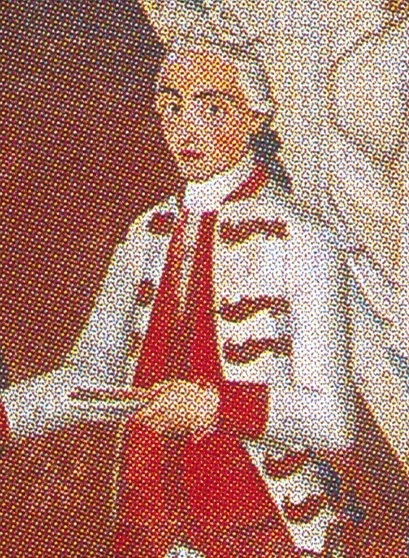 Detalle de José García de León y Pizarro en la pintura "José García de León y Pizarro visita el Hospital San Juan de Dios" de José Cortés Alcócer. Publicación original del lienzo en "Historia del Antiguo Hospital San Juan de Dios de Quito / Tomo I: Epoca Colonial (1565-1830)", de Moreno Egas, Jorge y Morán Proaño, Nancy (2012). Quito Ecuador: Fundación Museos de la Ciudad, Septiembre, 2012.Consultado y compartido por el usuario J. Javier García A.